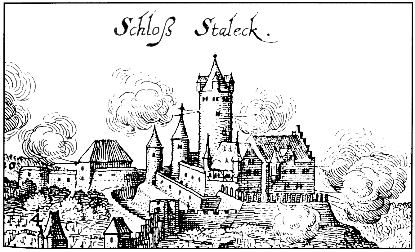 Eroberung der Burg Stahleck durch schwedische Truppen im Jahr 1632, Kupferstich aus Topographia Germaniae